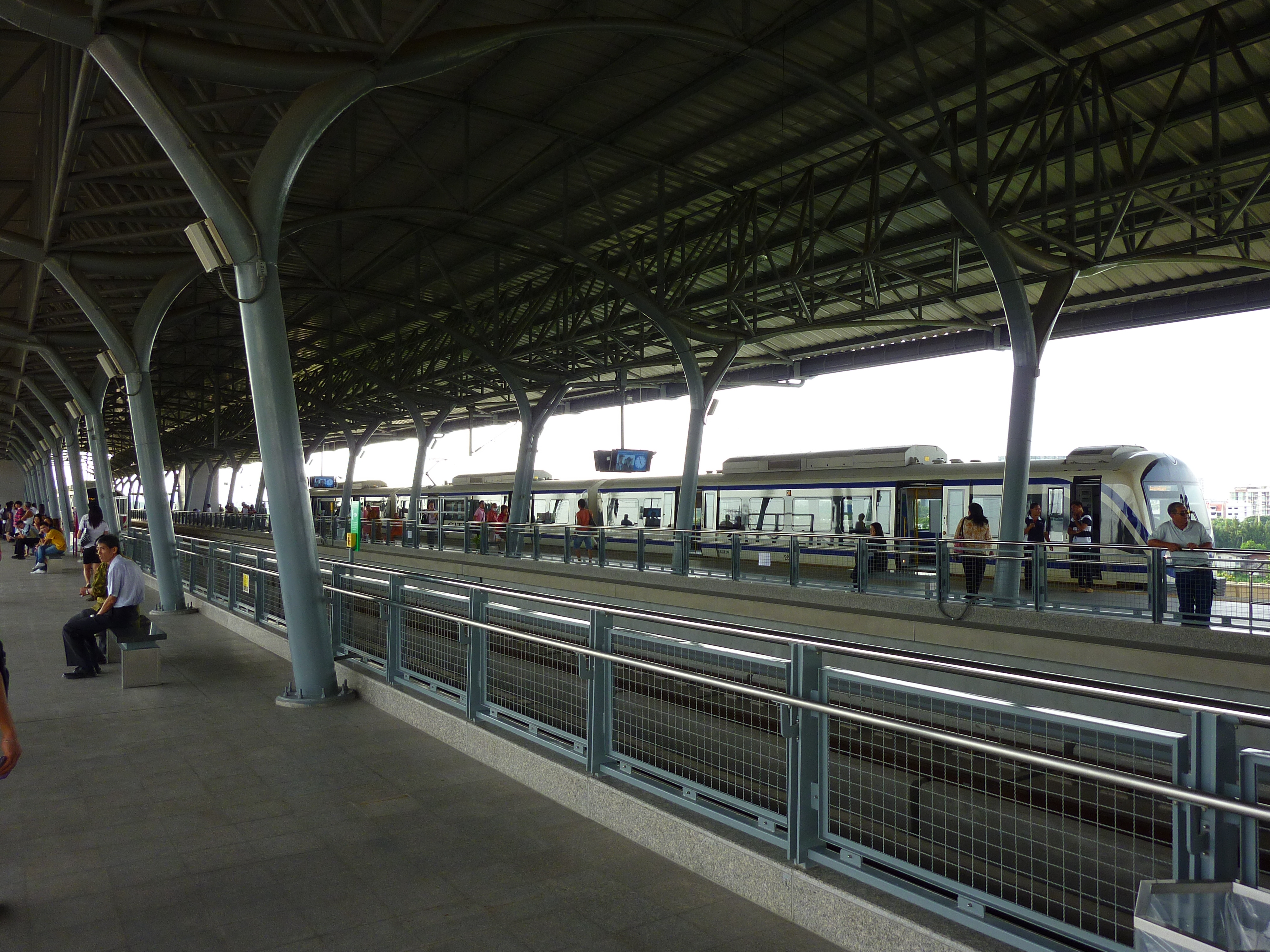 ชานชาลาสถานีรถไฟฟ้าท่าอาอาศยานสุวรรณภูมิ สถานีหัวหมาก